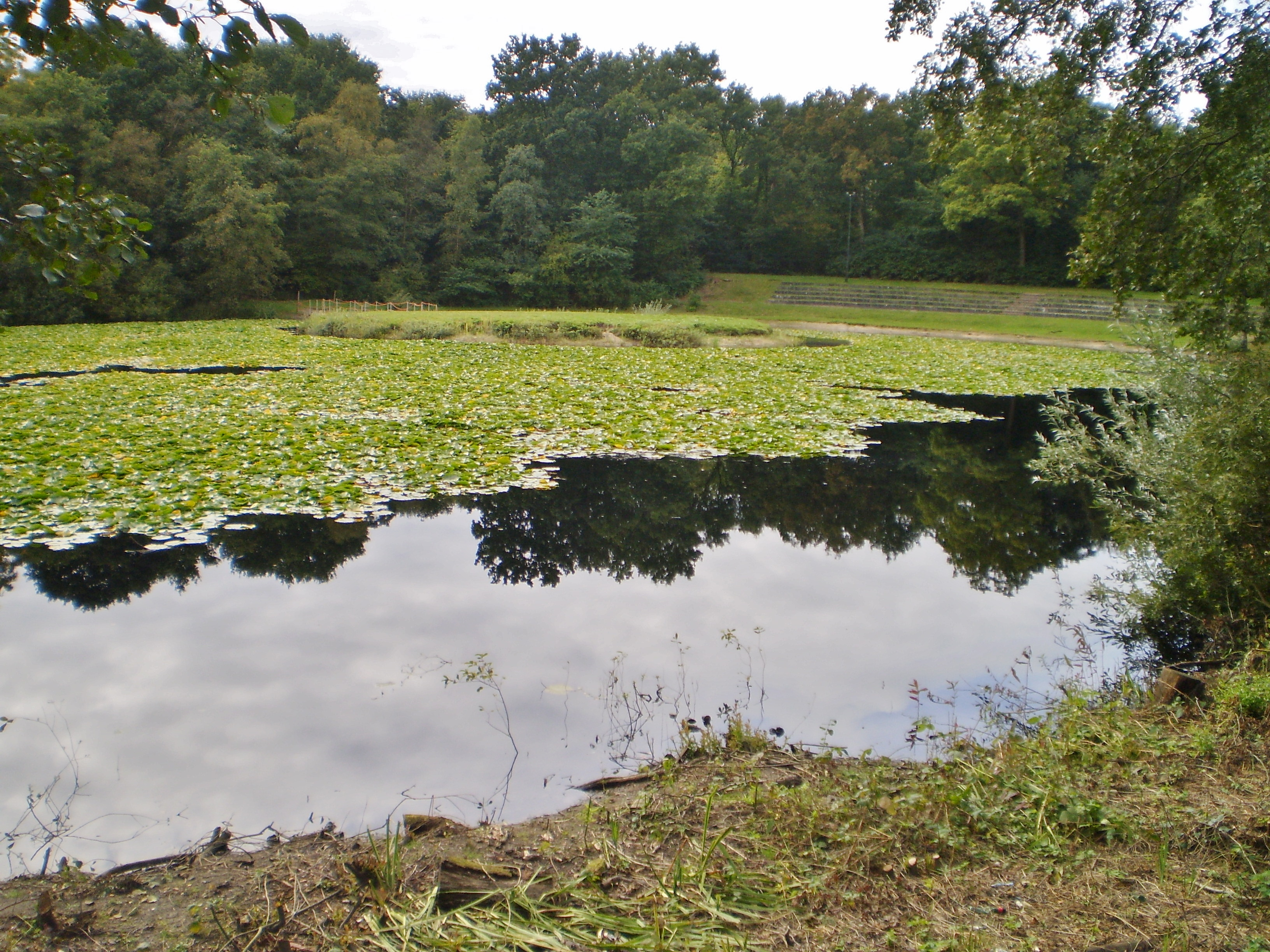 Vijver bij Rust Wat. Tussen Schapendrift en de Eemnesserweg. Vroeger als ijsbaan gebruikt